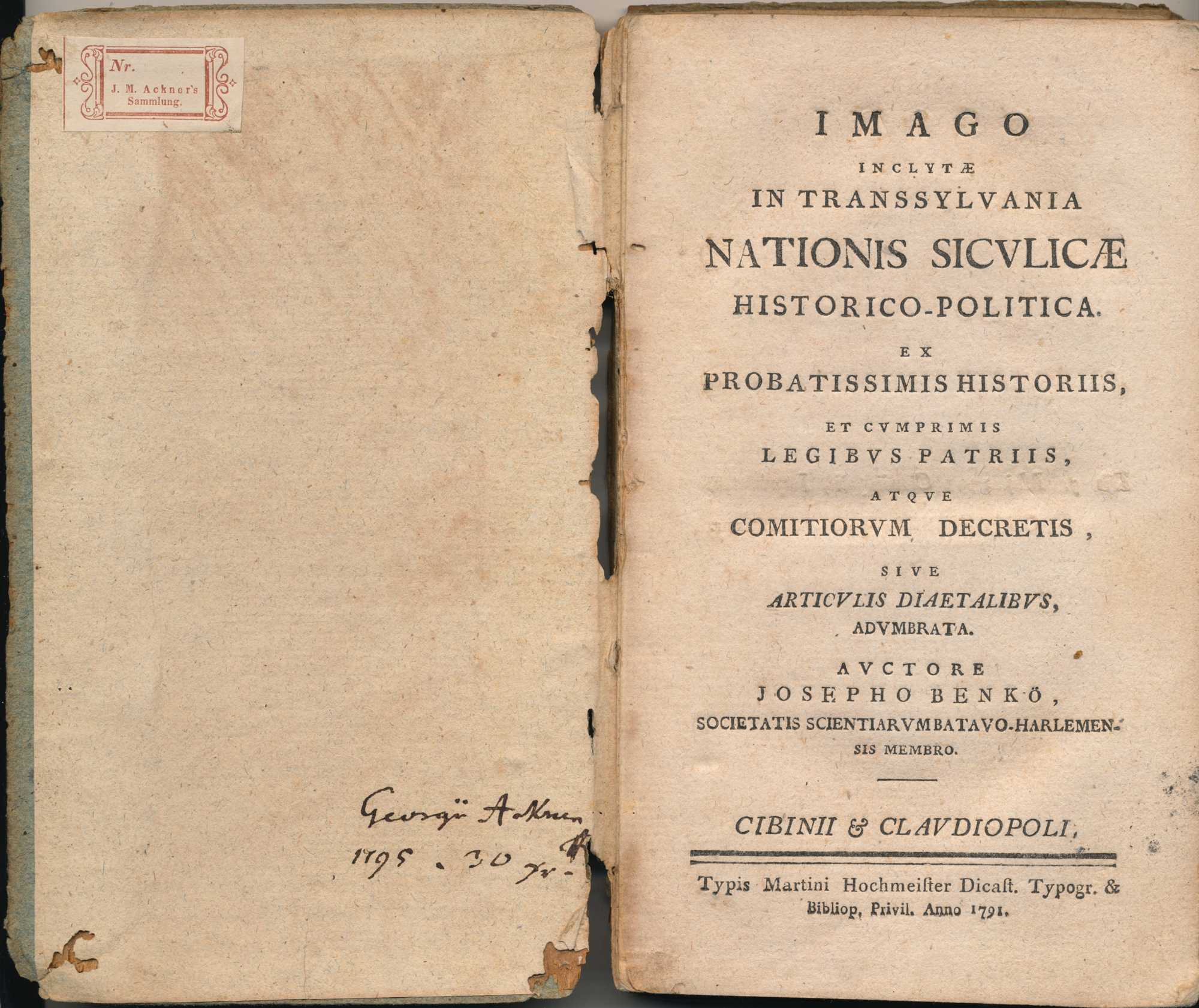 Imago inclytae in transsylvania nationis siculicae historio-politica ex probatissimis historiis et cumprimis legibus patriis, atque comitorium decretis, sive articulis diaetalibus, adumerata. Auctore Josepho Benkö, societatis scientiarumbatavo-harlemen sis membro. Cibinii & Claudiopoli. Typis Martini Hochmeister Dicast. Typogr. & Bibliop. Privii. Anno 1791. Aus der Sammlung Peter Schmelzle, Bad Wimpfen